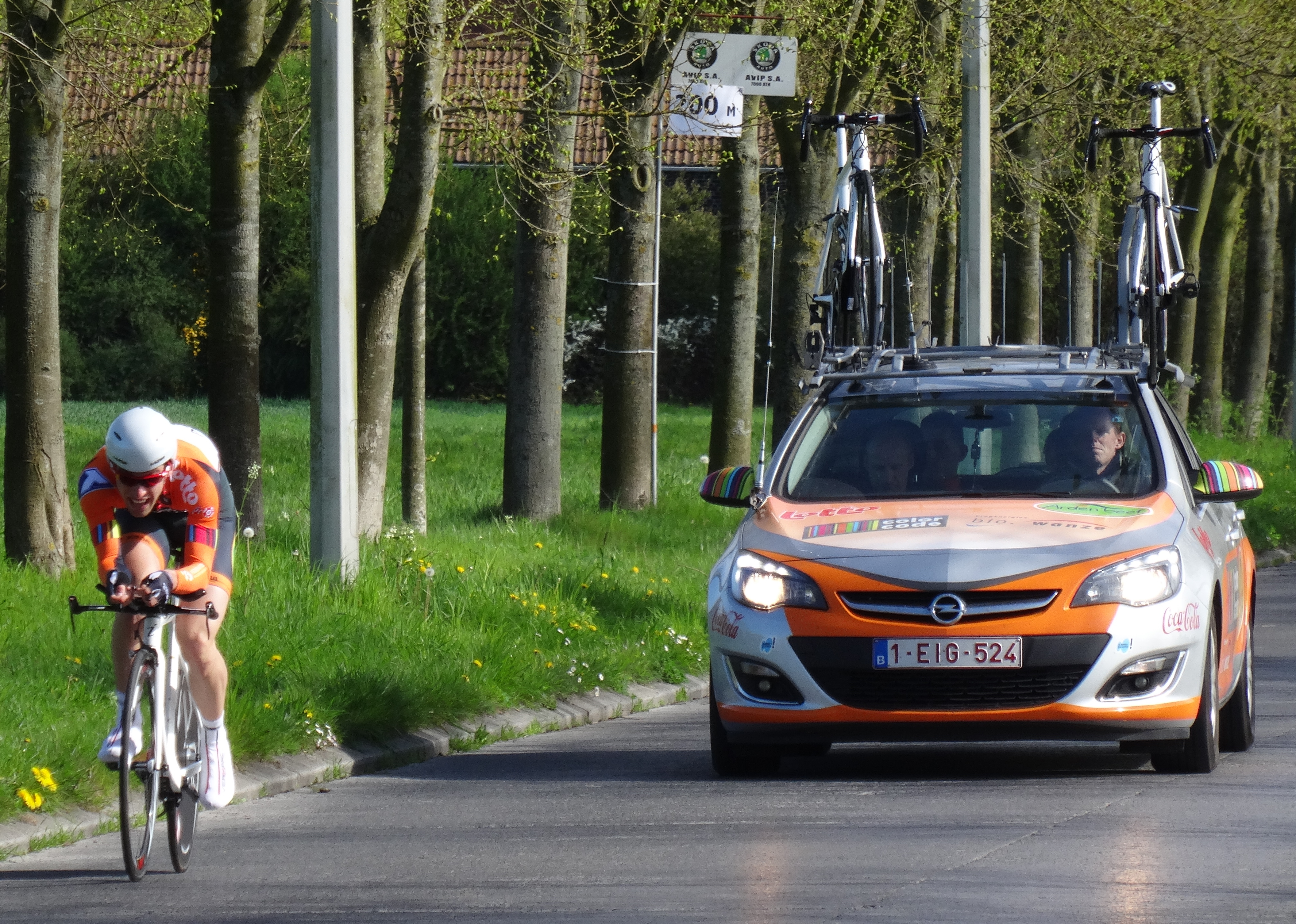 Triptyque des Monts et Châteaux 2014, étape 2a, 5 avril 2014, contre-la-montre individuel à Bernissart. Depicted person: Thomas Wertz Depicted team: Color Code-Biowanze The creation of these files was made possible thanks to the organizers of the Triptyque des Monts et Châteaux 2014 English | français | +/−